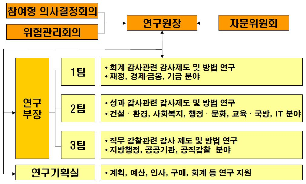 english